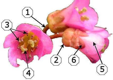 Kitoks žiedas